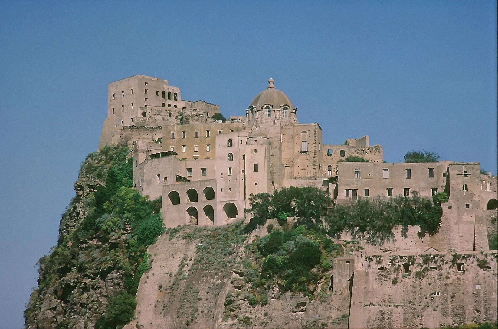 Das Castello Aragonese im Ortsteil Ponte auf der Insel Ischia